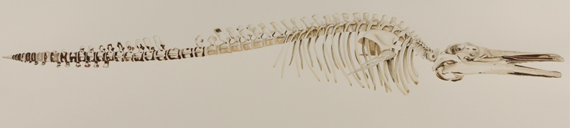 Dibujo de la naturalista de Geraldine McKinnon del esqueleto de la ballena del MNHN, 2010.